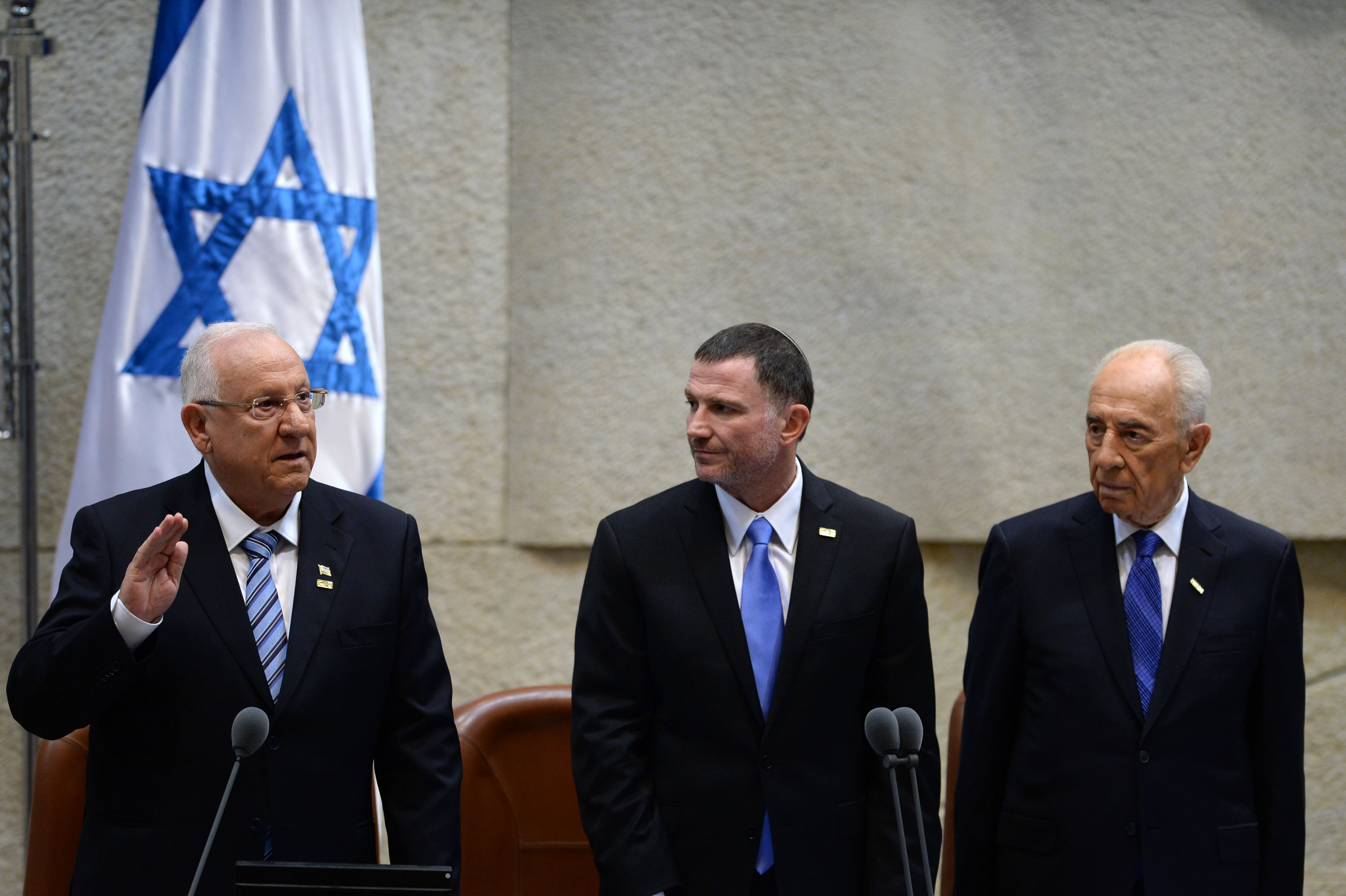 טקס השבעת אמונים בכנסת לנשיא הנבחר של מדינת ישראל ראובן רובי ריבלין